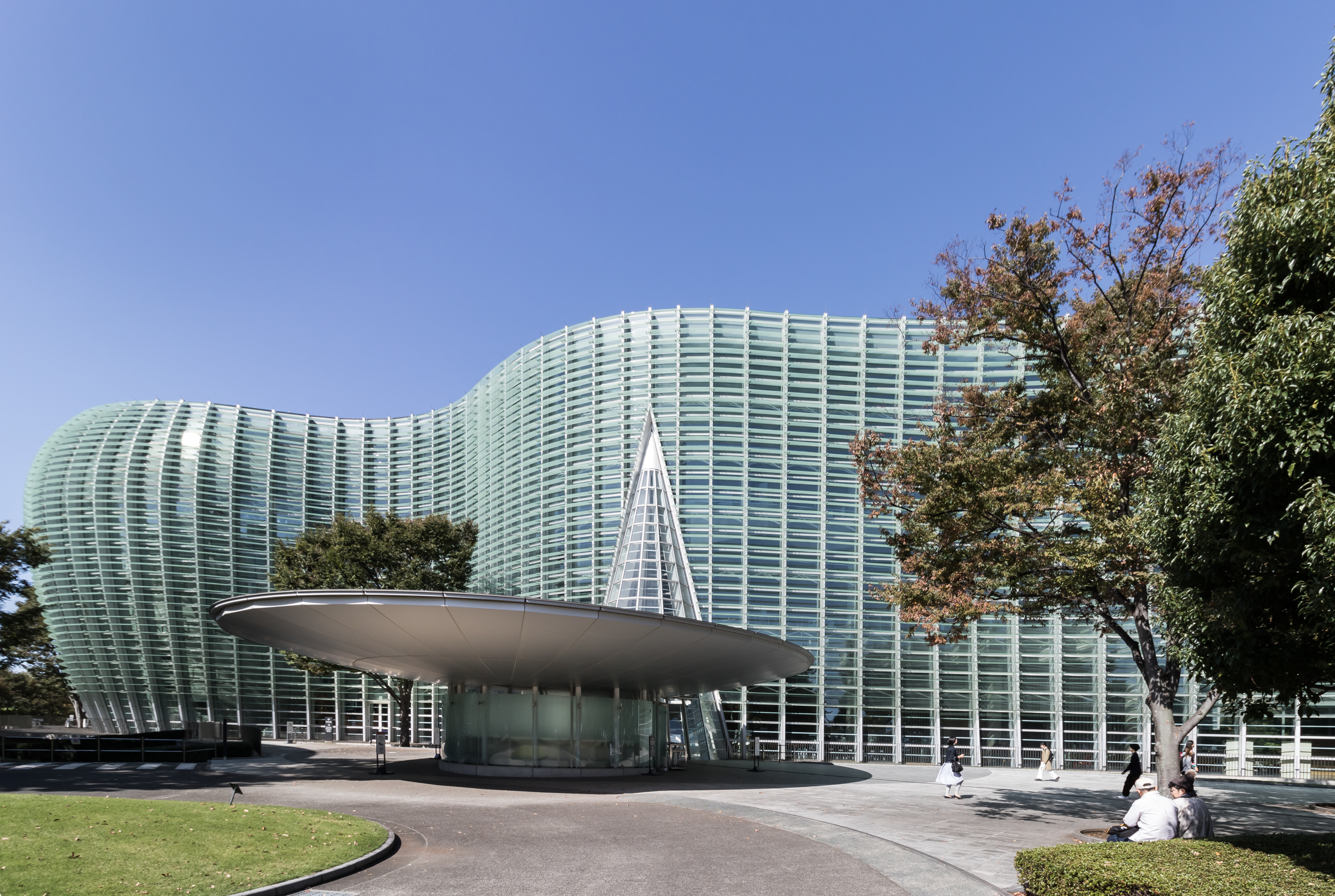 国立新美術館、東京都港区、黒川紀章設計。